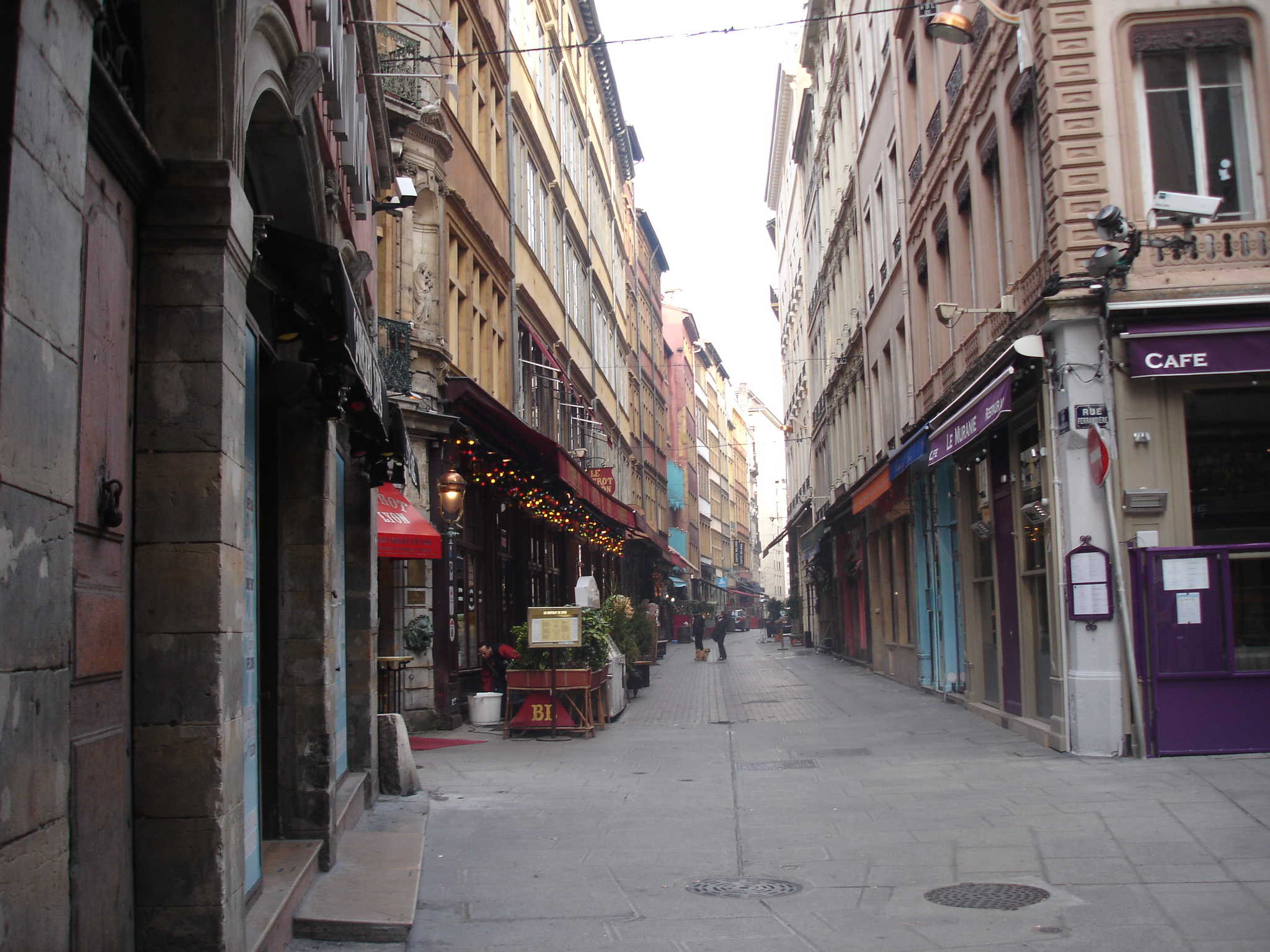 Lyon : vue de la rue Mercière